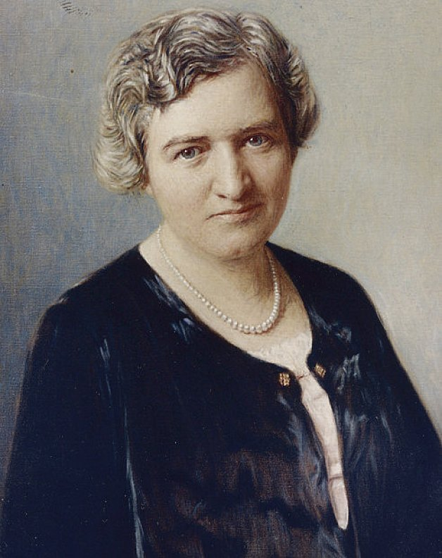 Hildegard Burjan. Gemälde von Tom von Dreger ´´